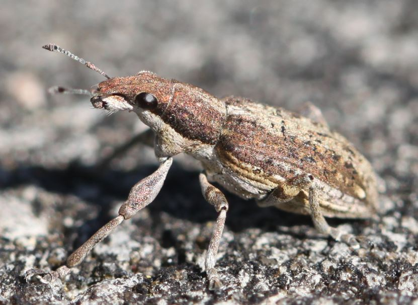 Rüsselkäfer Charagmus griseus am 7. April 2018 in der Schwetzinger Hardt